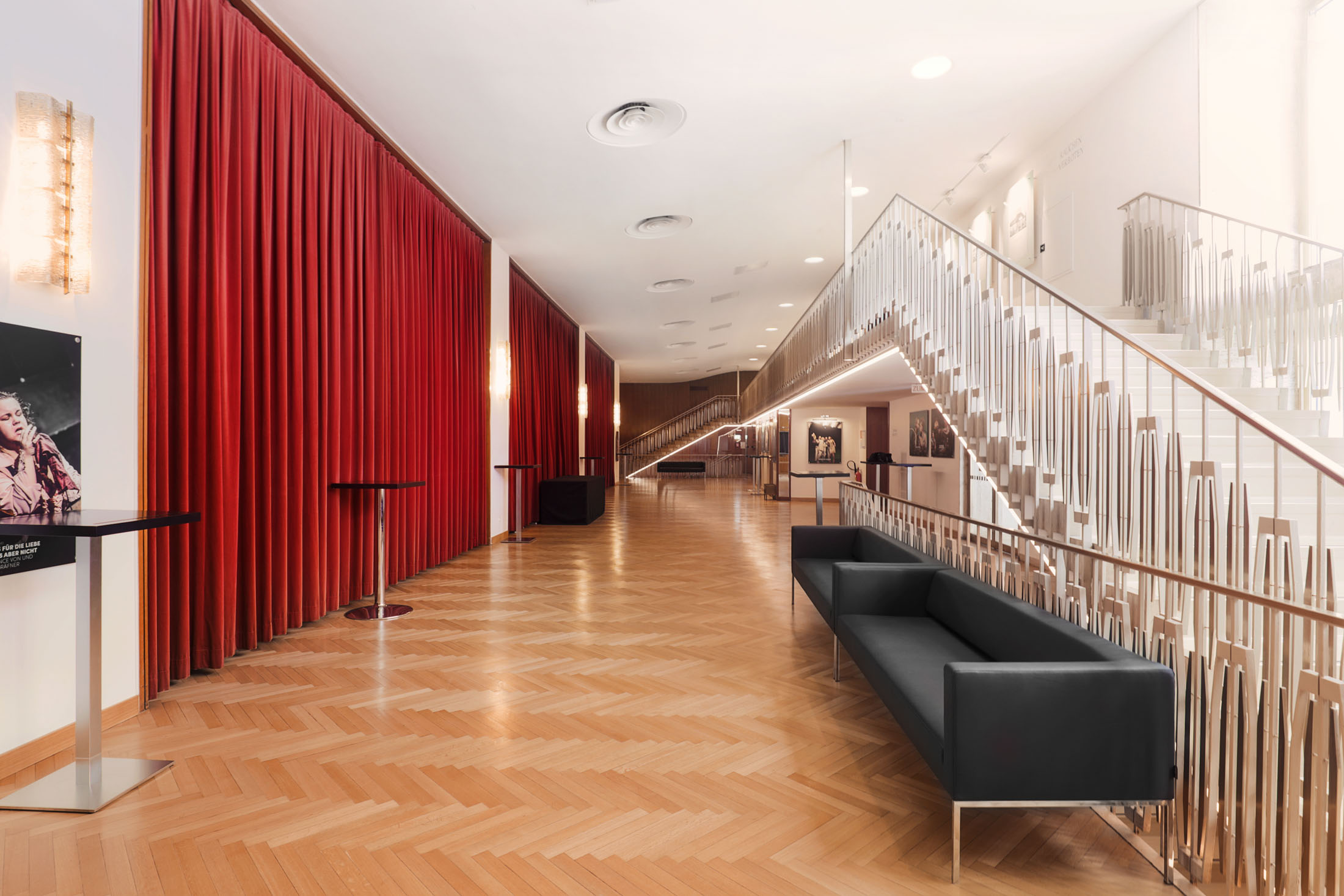 Schauspielhaus Graz - Foyer im ersten Rang